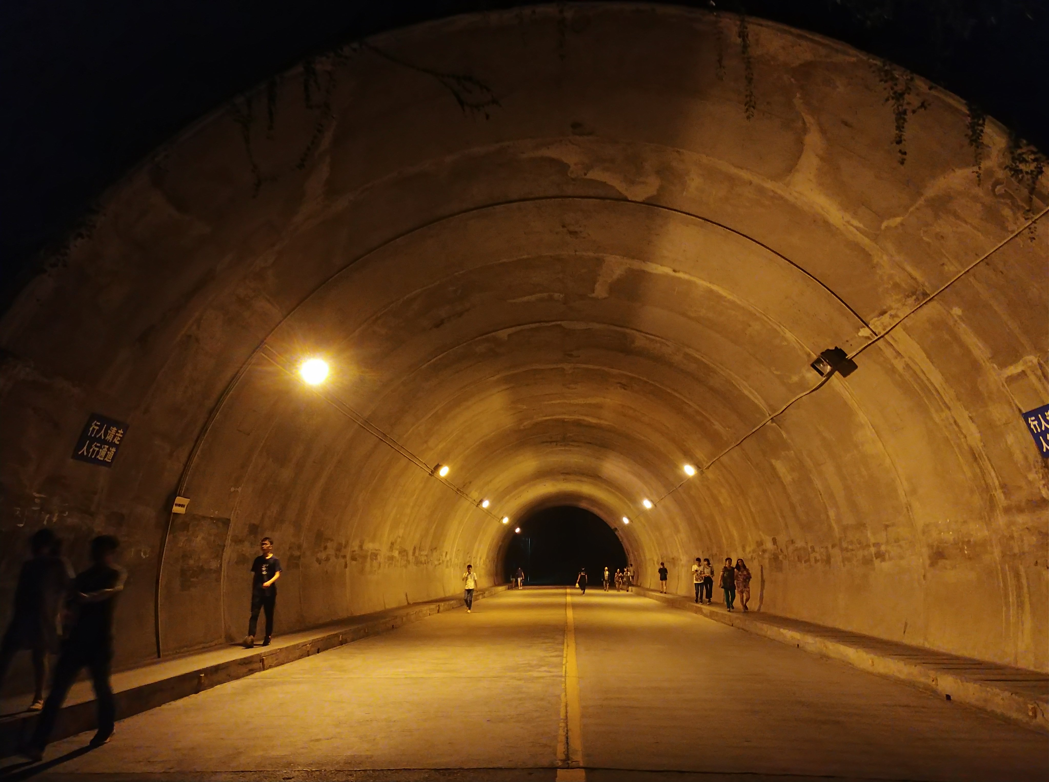 中文（中国大陆）: 重庆理工大学夜景，士继门